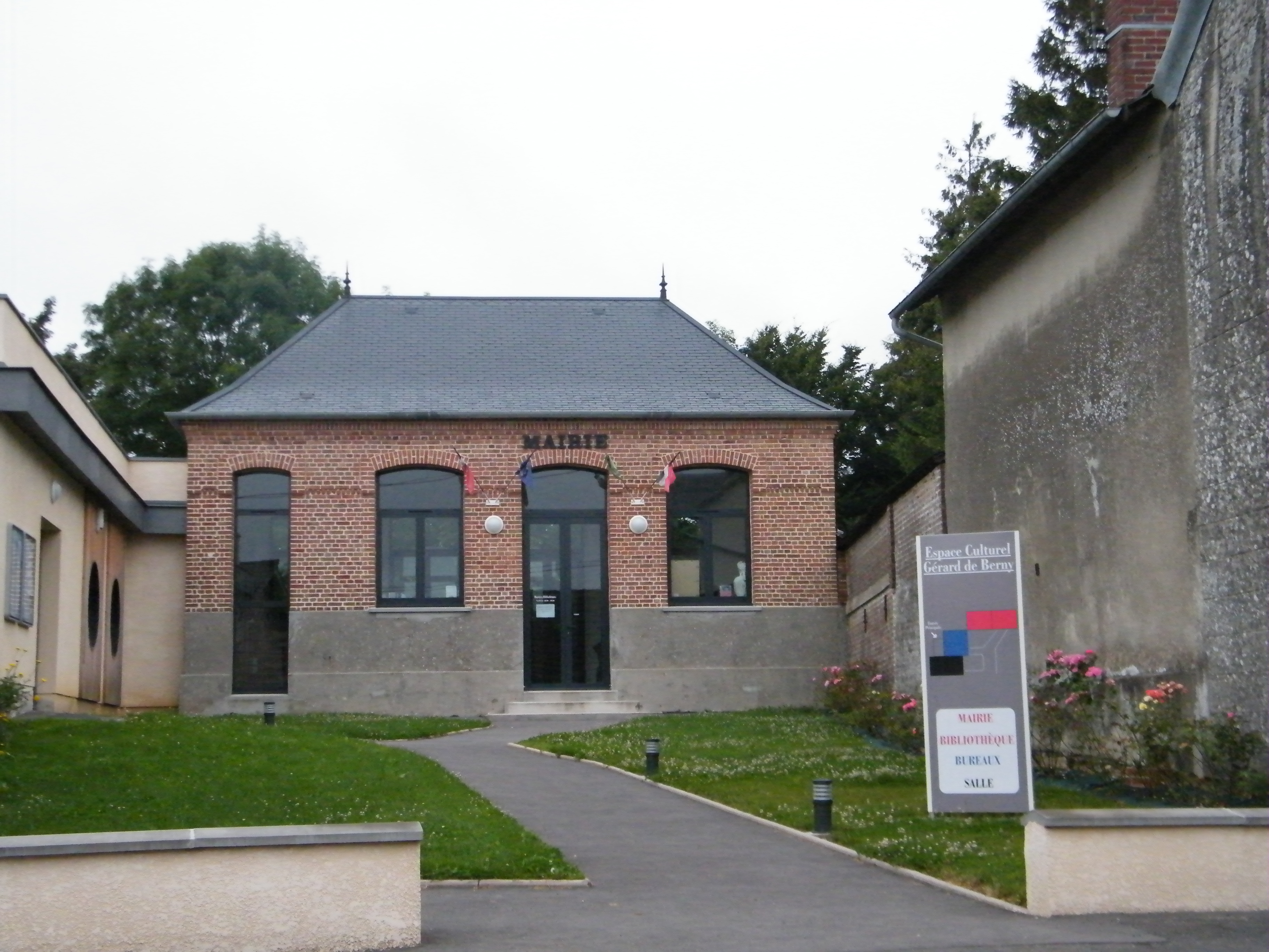 Mairie.